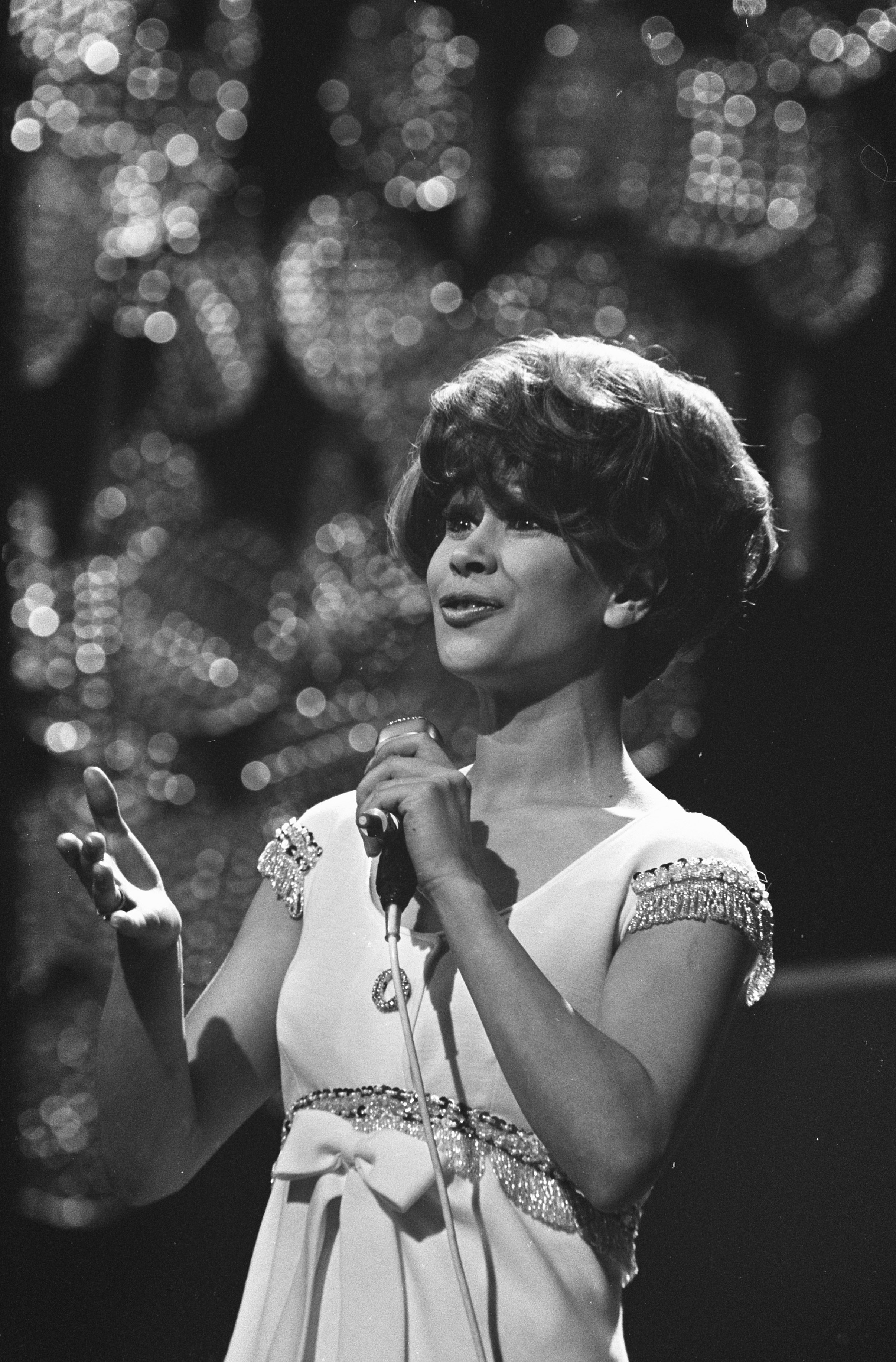 Collectie / Archief : Fotocollectie Anefo Reportage / Serie : [ onbekend ] Beschrijving : Nationale finale van het Eurovisie Songfestival in Scheveningen Anneke Gronloh Datum : 26 februari 1969 Locatie : Scheveningen, Zuid-Holland Trefwoorden : SONGFESTIVALS, finales Persoonsnaam : Grönloh, Anneke Fotograaf : Koch, Eric / Anefo Auteursrechthebbende : Nationaal Archief Materiaalsoort : Negatief (zwart/wit) Nummer archiefinventaris : bekijk toegang 2.24.01.05 Bestanddeelnummer : 922-1426